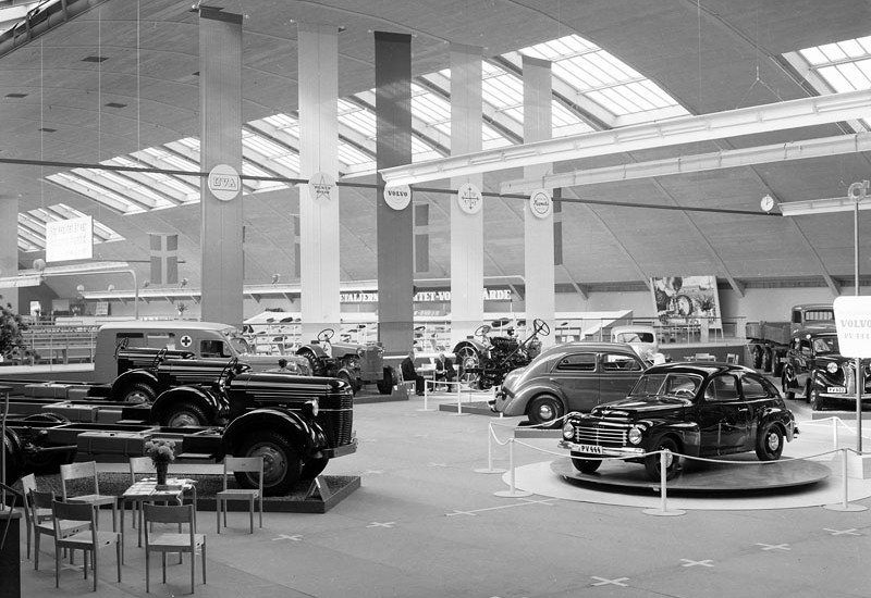 Kungliga Tennishallen. Sankt Eriks-Mässan, Volvoutställning, där bland annat Volvo PV 444 presenteras (t. h. på bilden)